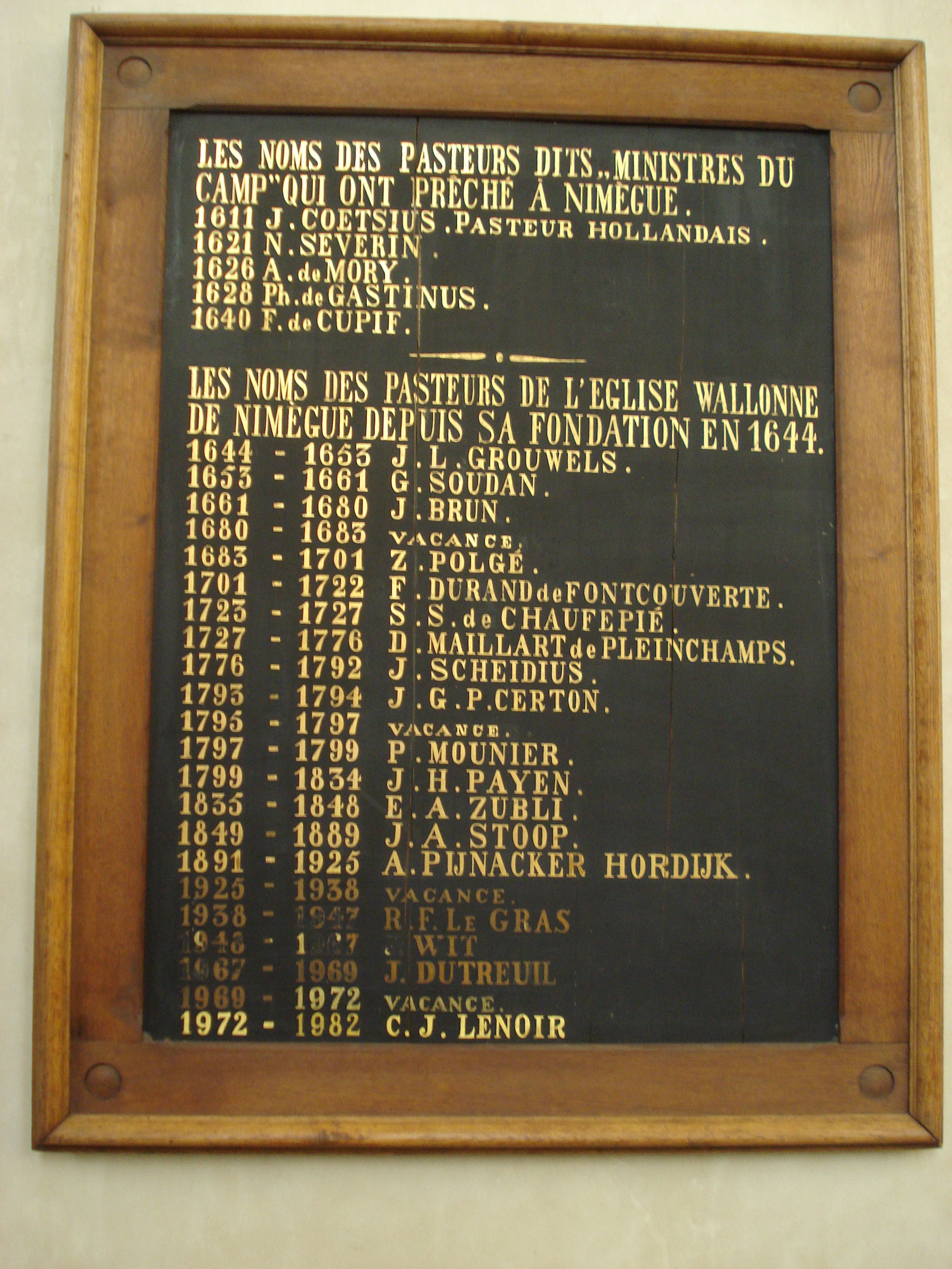 Liste des pasteurs de l'eglise wallone de Nimègue, Pays-Bas